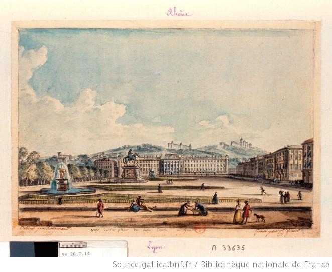 Vue de la Place Bellecour à Lyon